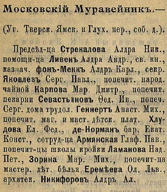 1904 Благотворительное общество Московский Муравейник